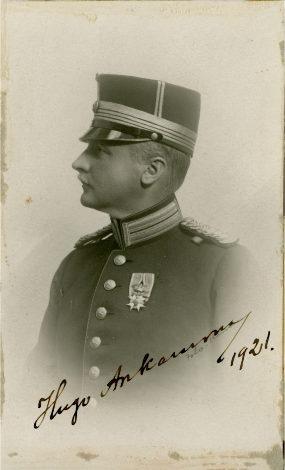 Porträtt av Adolf Hugo Emanuel Ankarcrona, officer vid Västerbottens regemente I 20.